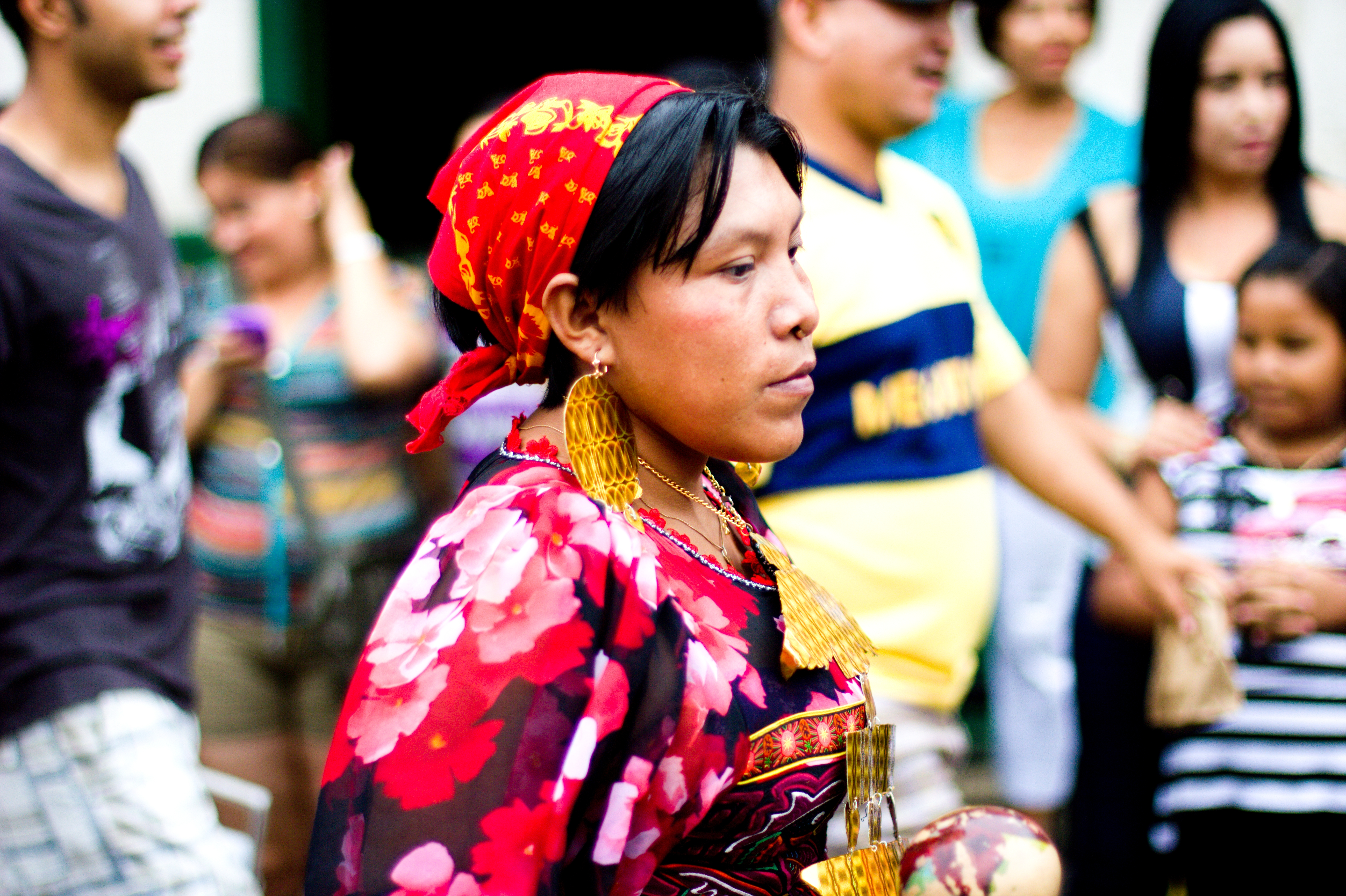 Mujer de la etnia Guna en desfile folclórico en Chitré, provincia de Herrera